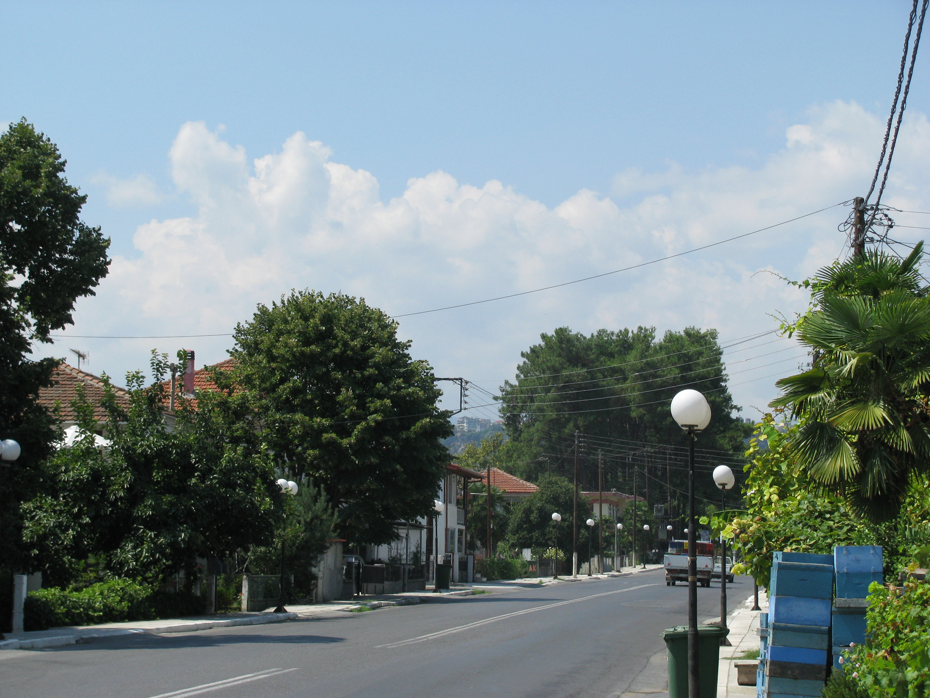 Village of Orizari or Rizari, Pella prefecture, Greece